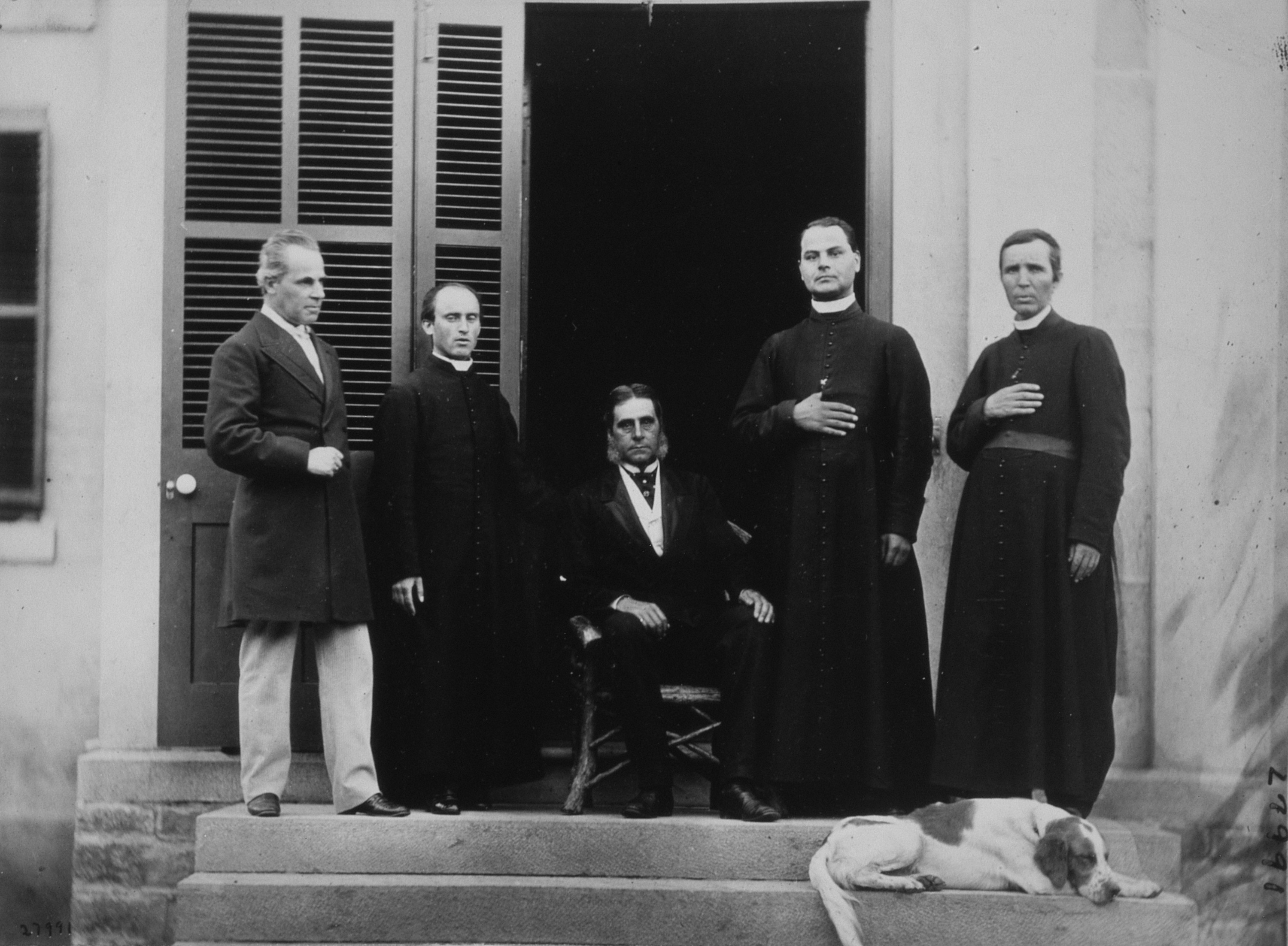 Photographie - Hon. George Étienne Cartier, M. Cuvillier et trois prêtres, Montréal, Qc, 1867 - Sels d'argent sur papier monté sur papier - Papier albuminé